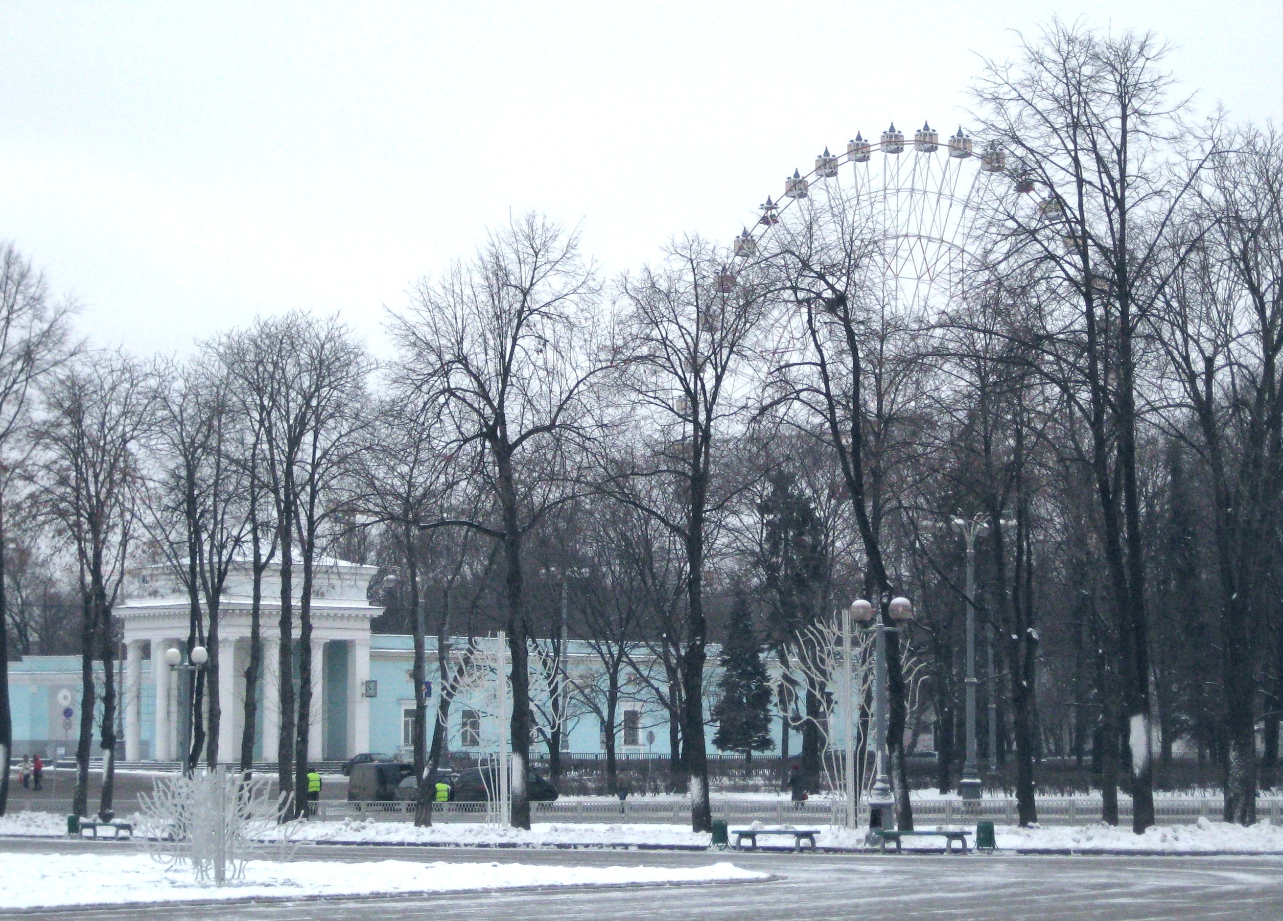 ВДНХ зимой в снегу, колесо обозрения, вид слева от главного входа